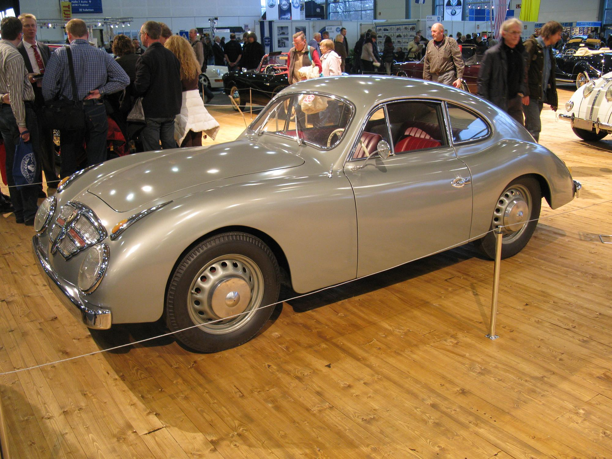 Karosserie Rometsch